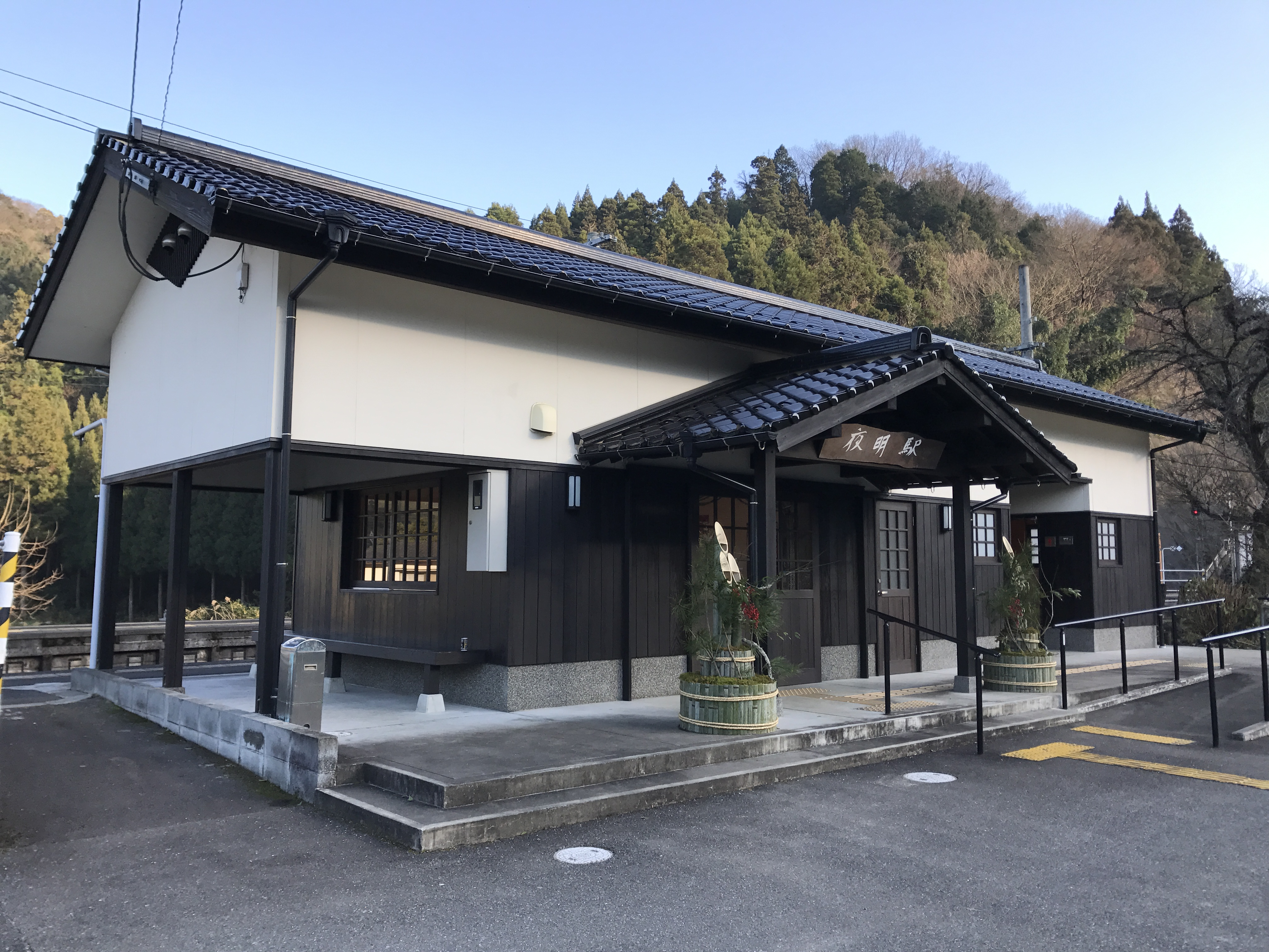 夜明駅駅舎